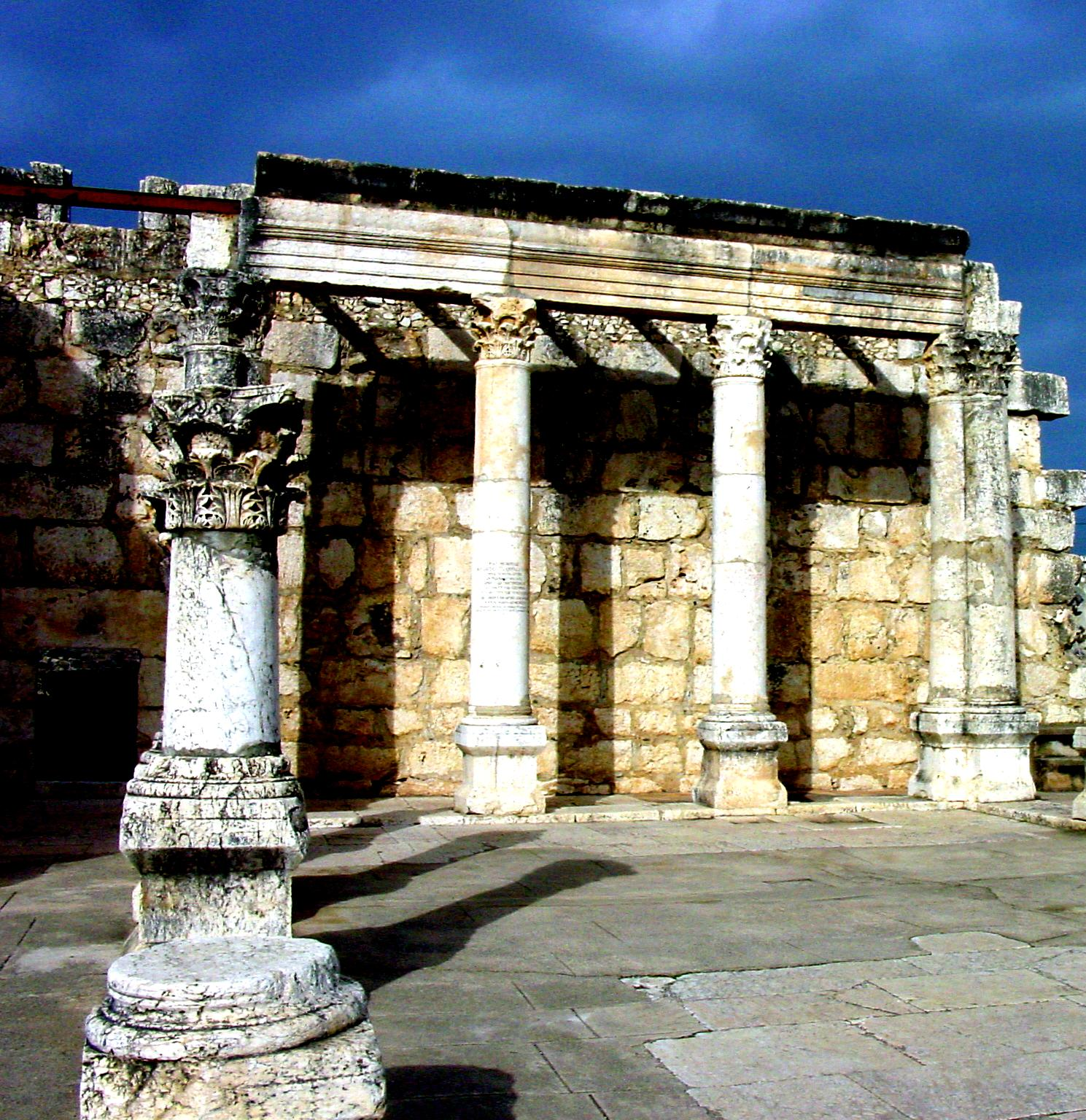 Капернаум, Израел, децембар 2003. (слику направио Борис Малагурски) ☺ Ову слику је направио Борис Малагурски.